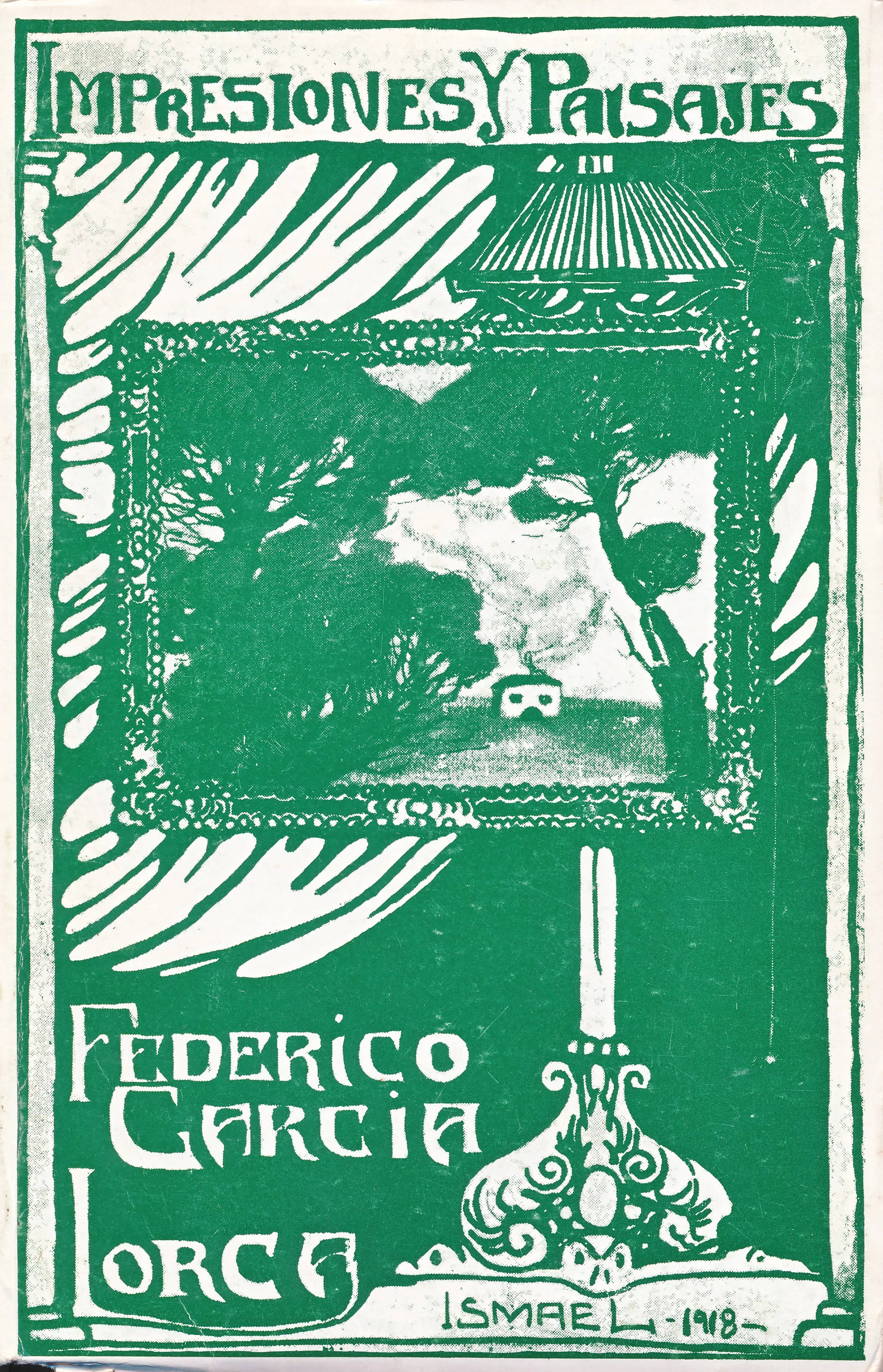 Impresiones y paisajes es un libro de viajes de 1918 escrito por el poeta y dramaturgo español Federico García Lorca.